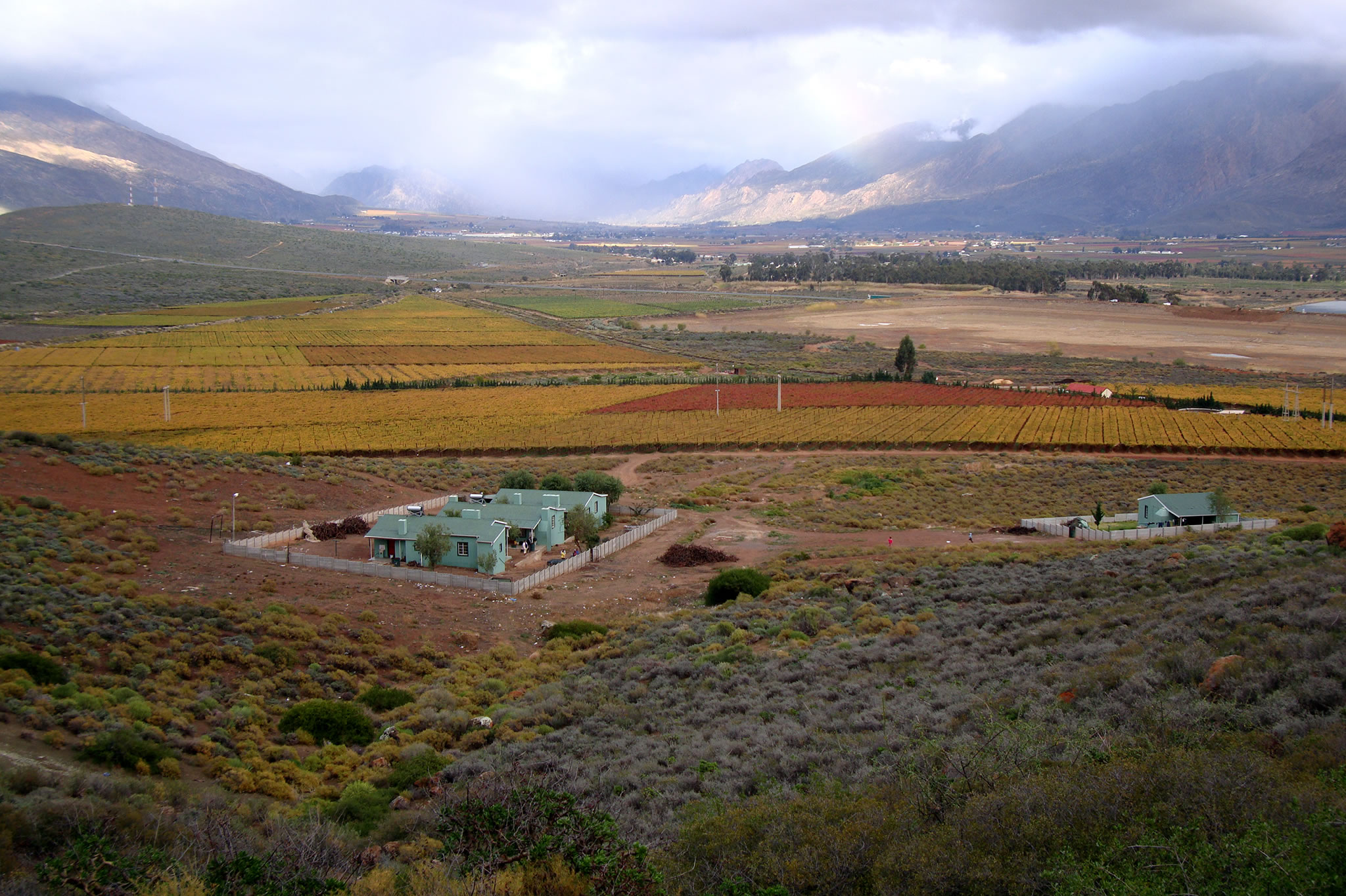 De Doorns, Western Cape